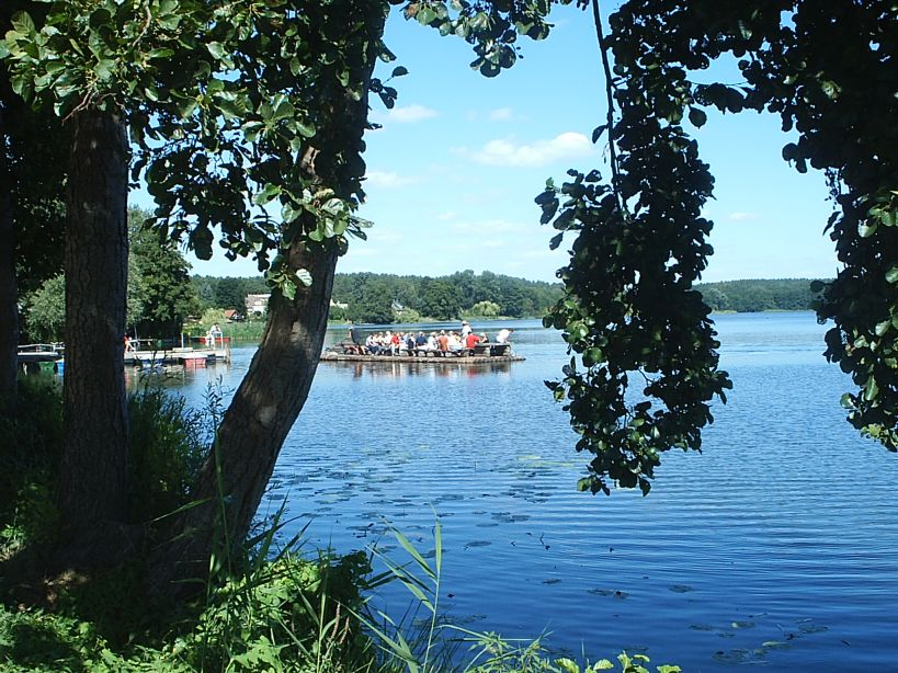 Der Oberpfuhl, Floßfahrt in Lychen. Jede Veränderung am Bild bitte ich mir mitzuteilen, z. B. unter Benutzer:Elborn, bzw. der dortigen Diskussionsseite.